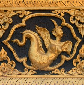 เงือกงู วัดแสนเมืองมาหลวง(วัดหัวข่วง) อำเภอเมือง จังหวัดเชียงใหม่